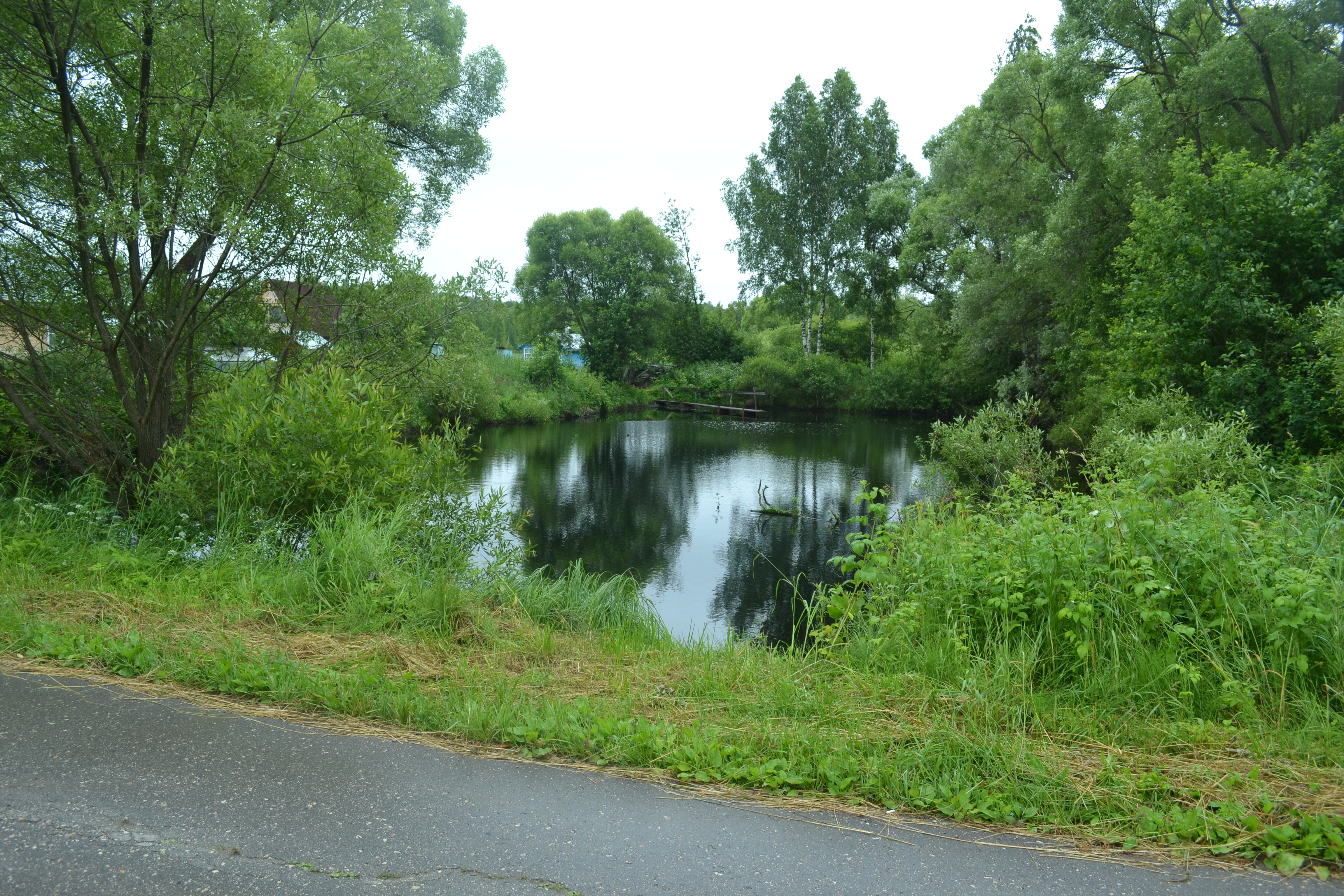 Пруд в деревне Маврино (Шатурский район)